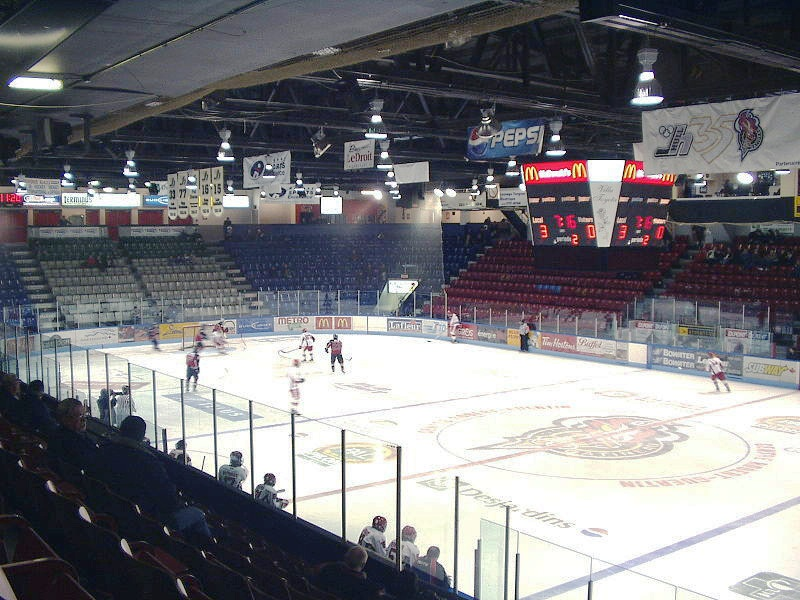 Intérieur du Centre Robert-Guertin